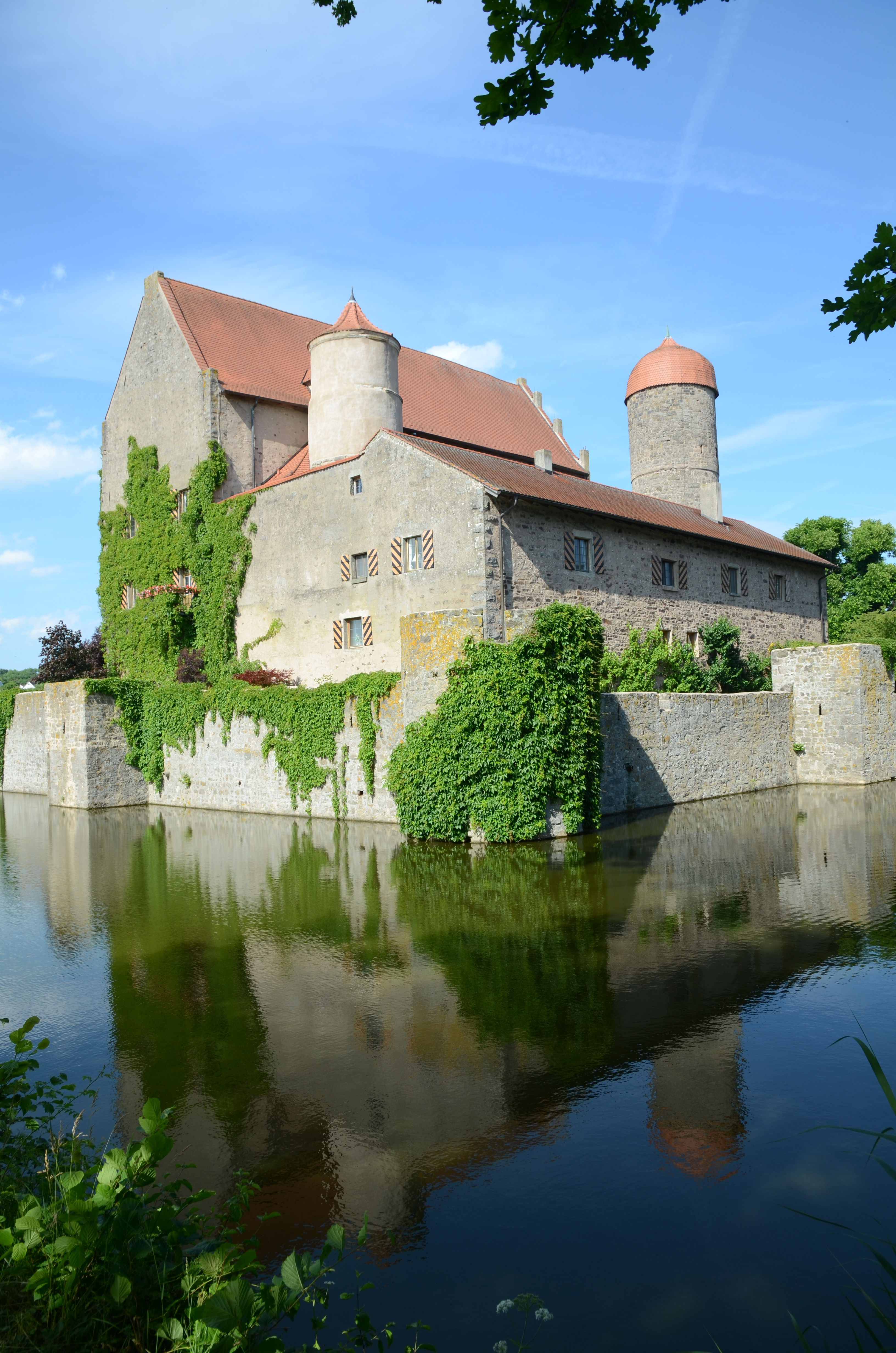 Schloss SommersdorfThis is a photograph of an architectural monument.